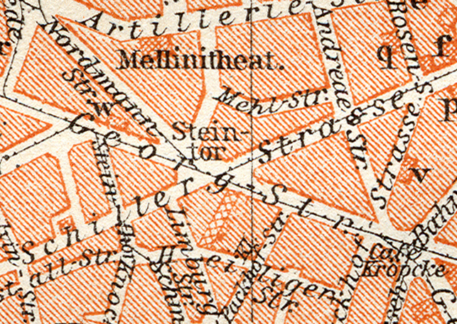 Ausschnitt aus dem Stadtplan von Hannover der Geographischen Anstalt von Wagner & Debes aus Leipzig aus dem Jahr 1911 mit dem damaligen Platz Steintor als platzartige Erweiterung im Verlauf der Georgstraße und als Schnittpunkt von fast 7 ausstrahlenden Straßenzügen nahe der hier schon angedeuteten, projektierten Georgspassage im Drachentöterhaus.